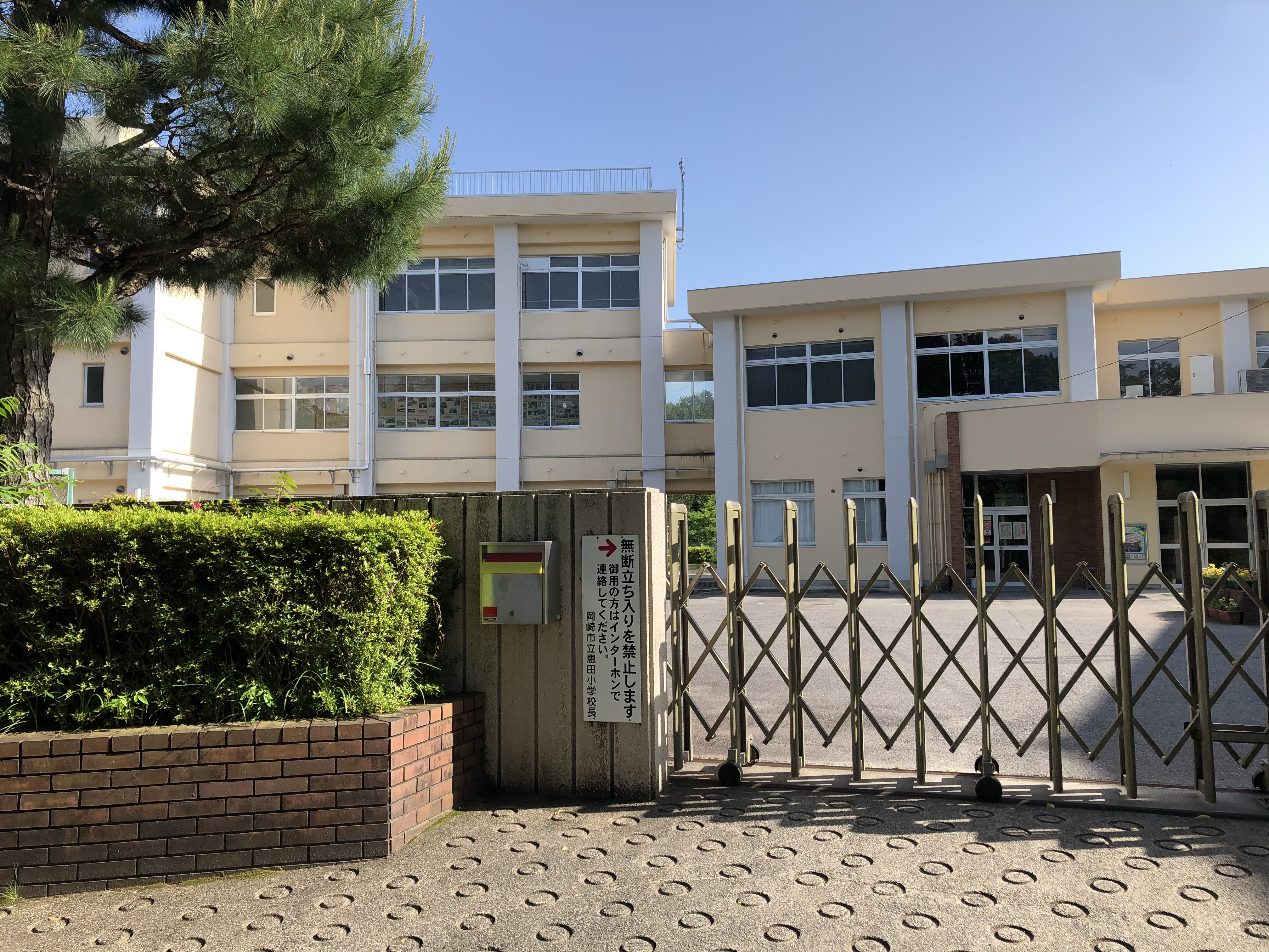 岡崎市立恵田小学校（岡崎市恵田町）